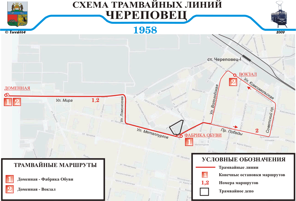 Схема трамвайных маршрутов Череповца 1958 г.